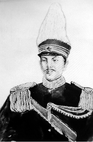 中文（台灣）: 新疆阿山道道尹周务学，照片由其曾孫周建睿所提供